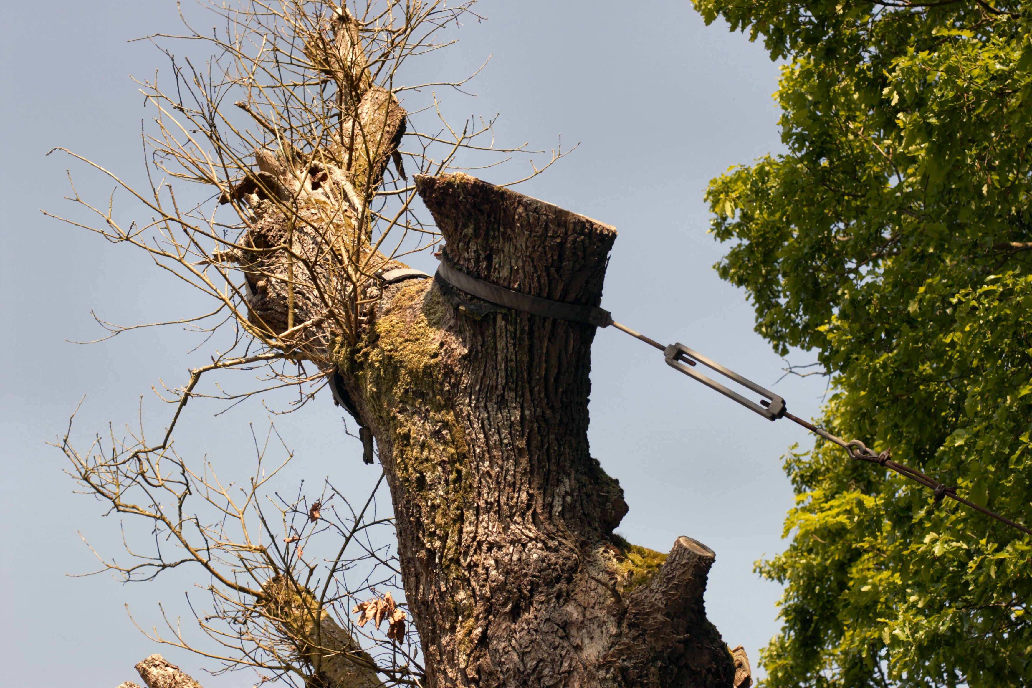 Den hule eg ved Århusbakken i Silkeborg